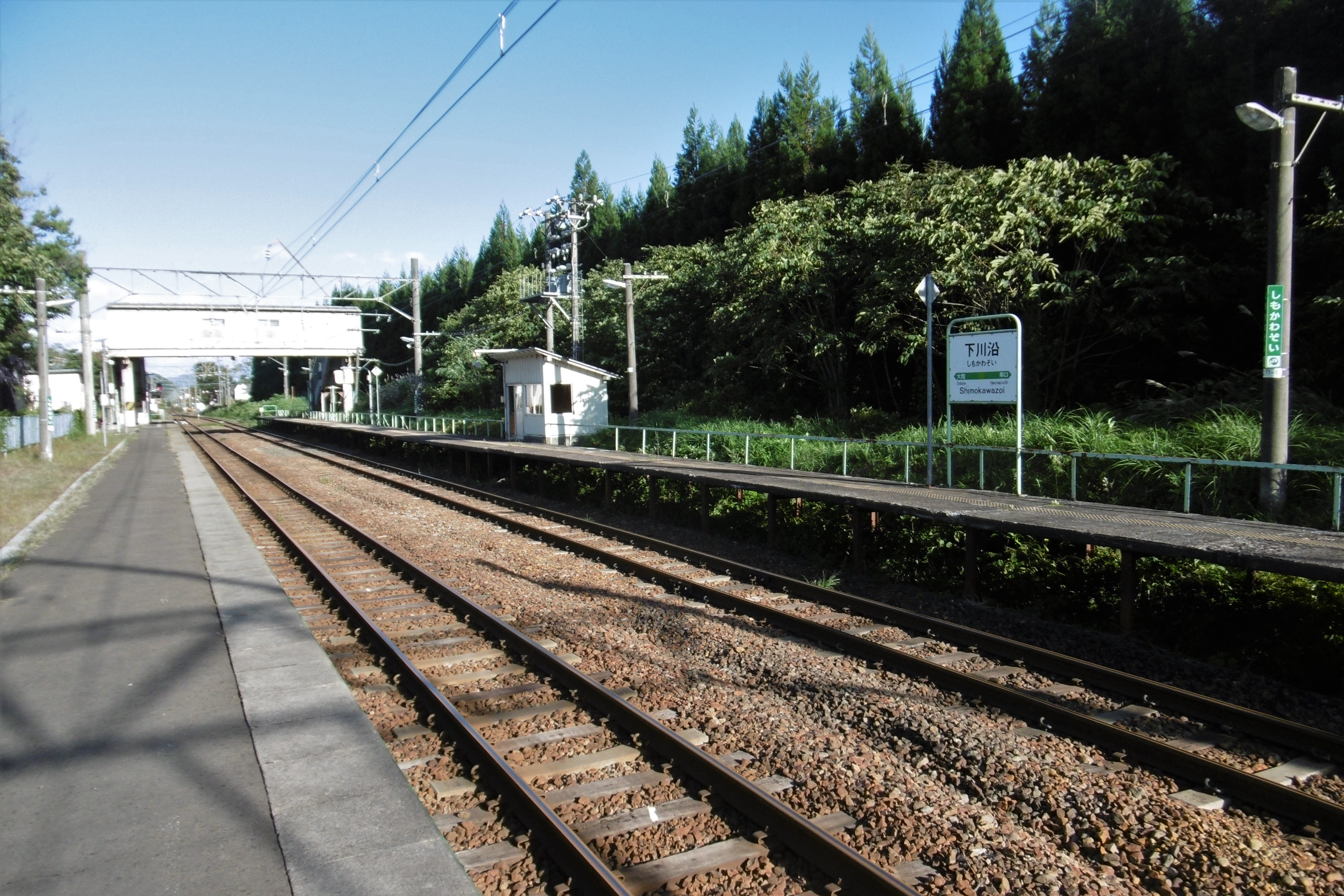 下川沿駅ホーム